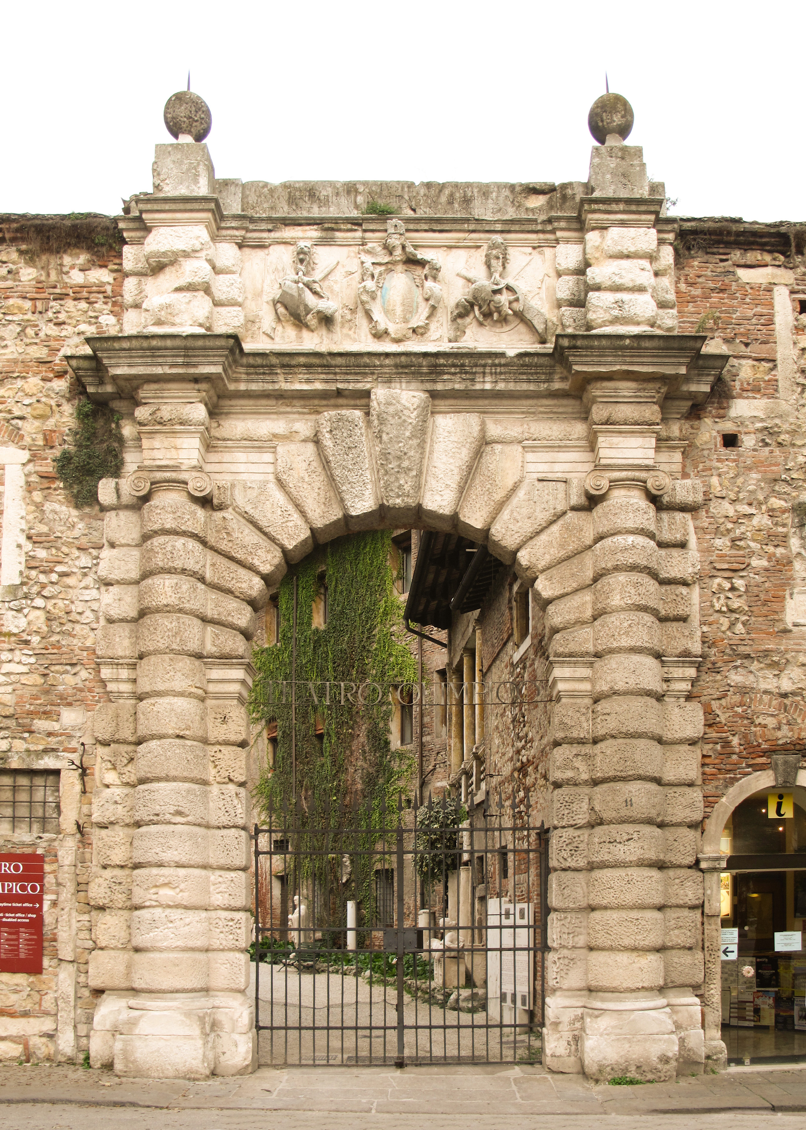 Vicenza - Arco d'ingresso al Teatro Olimpico, attribuito all'architetto Ottavio Bruto Revese